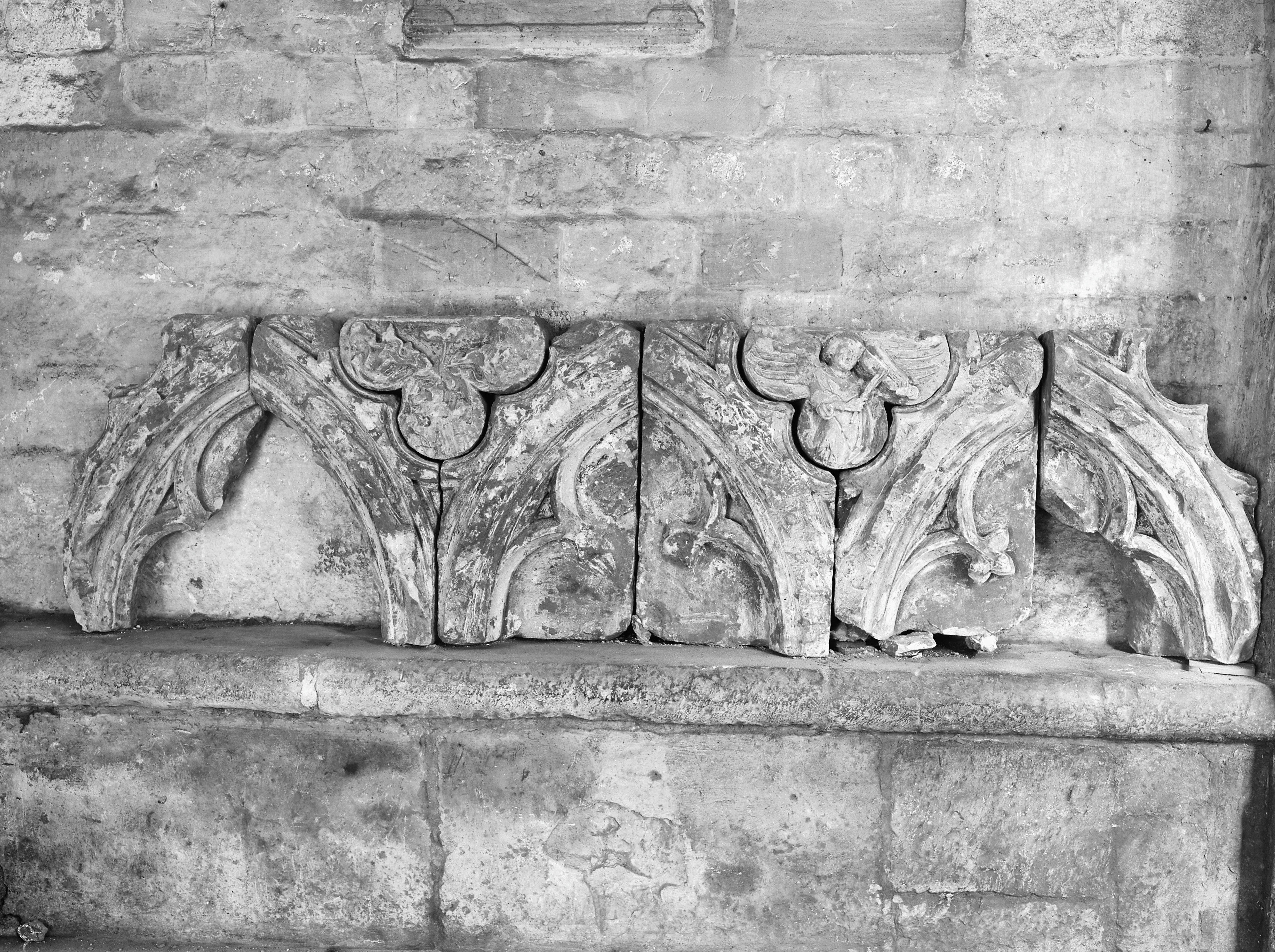 Sint Servaaskerk: Interieur opgraving oksaal